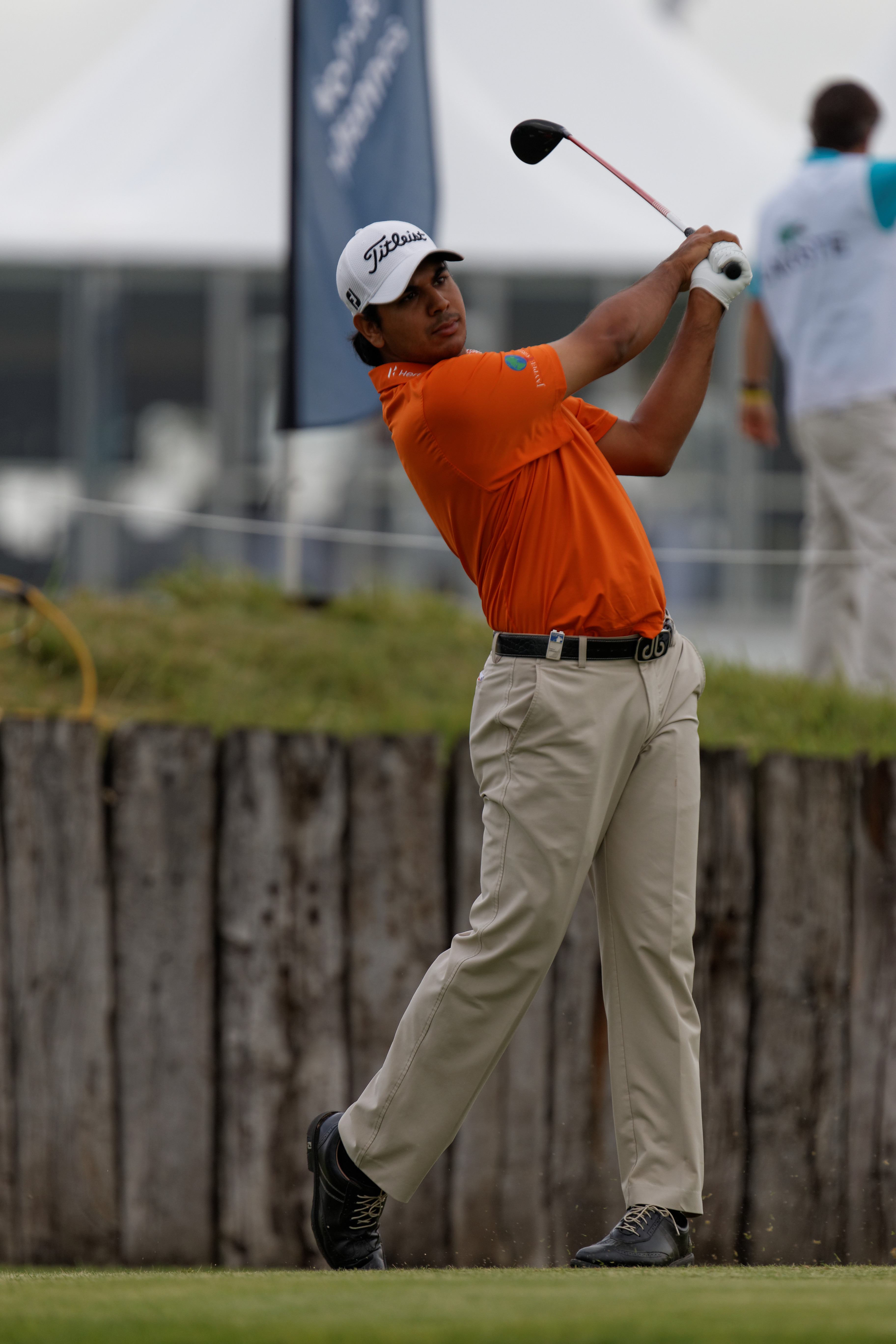 Gaganjeet Bhullar lors du second tour de l'Open de France 2014 - Golf National - Saint-Quentin-en-Yvelines (78) - départ du trou n° 10